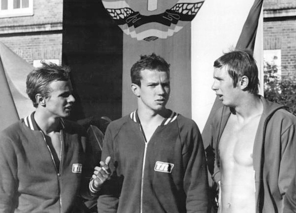 Wilfried Hartung, Hartmut Flöckner, Lothar Gericke